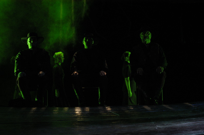 A Vérnász című előadás a Magyar Állami Operaházban.